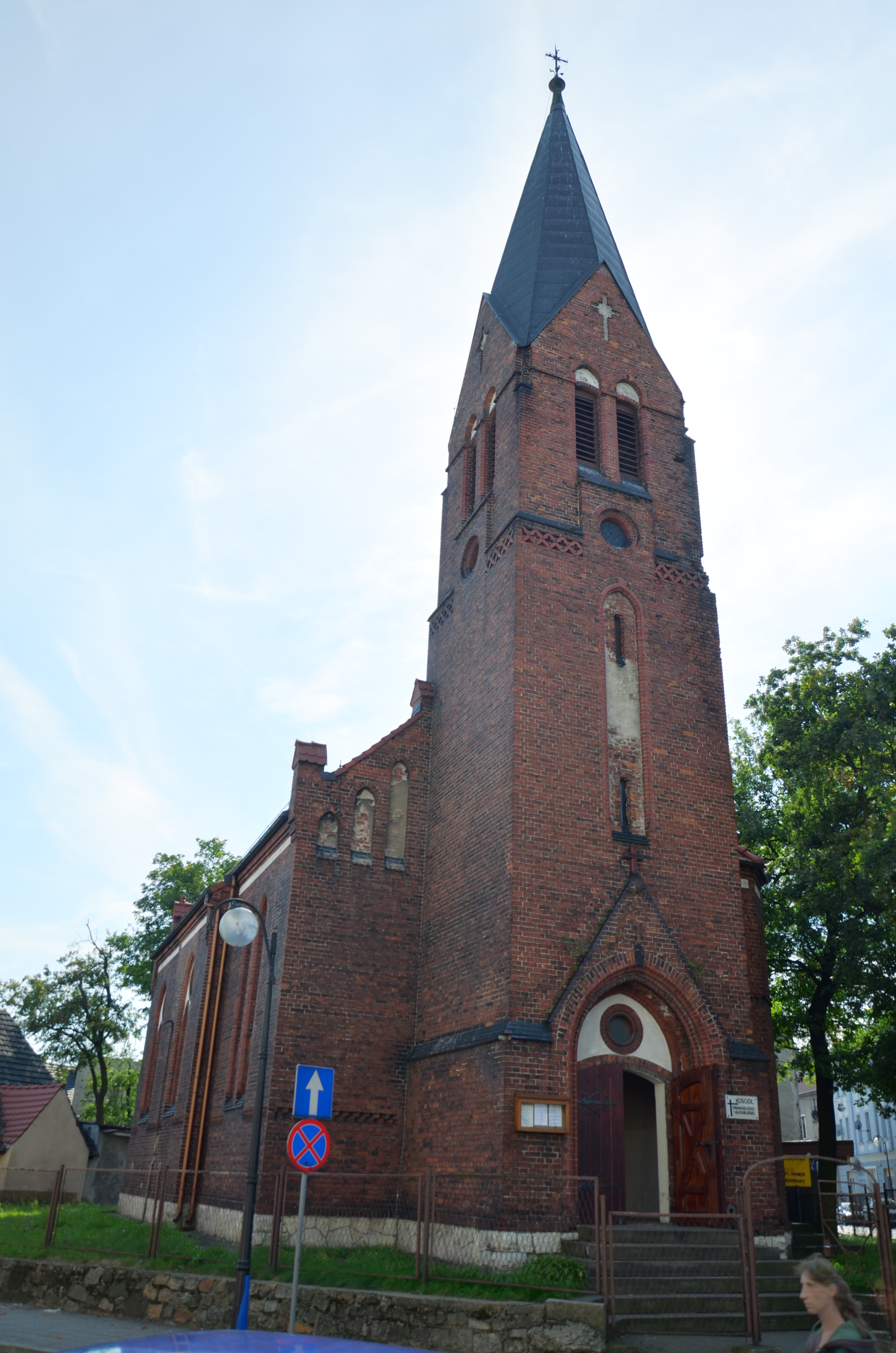 Kędzierzyn-Koźle, ul. Głowackiego 17 - kościół ewangelicko-augsburski, widok od ul. Głowackiego (zabytek nr 04/2001 z 30.08.2001)